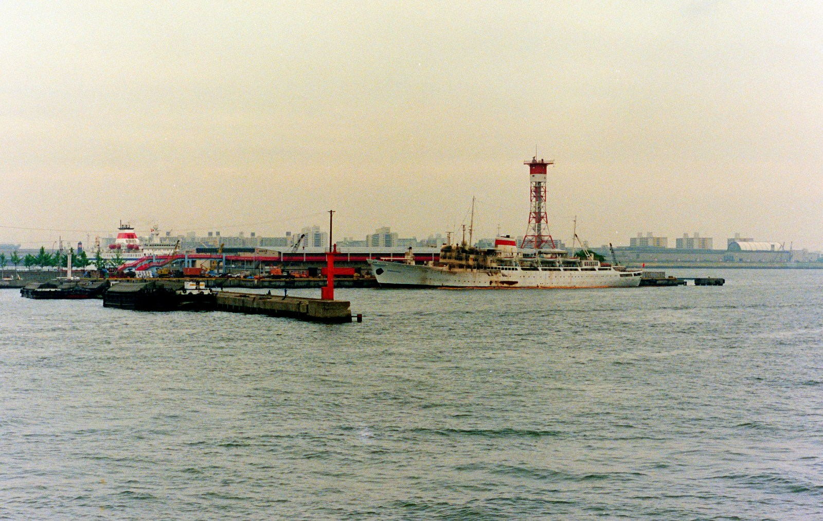 大阪港中央突堤にて火災事故後のソ連極東船舶公団客船・プリアムーリェ。反対側では被災乗客用に回航されてきた、同客船・コンスタンチン・チェルネンコが着岸作業中。